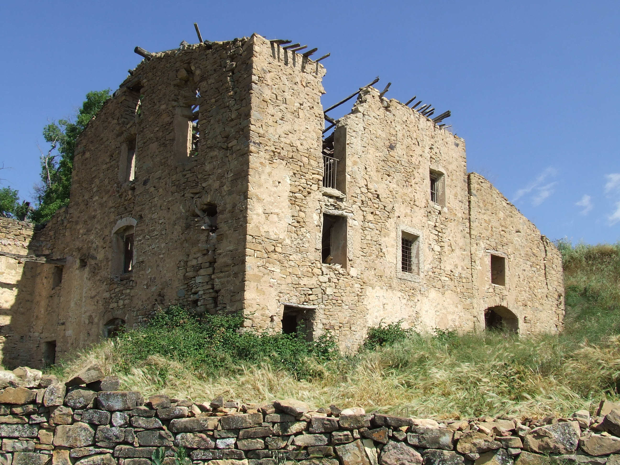 Ruïnes de Castelló d'Encús (Talarn, Pallars Jussà)